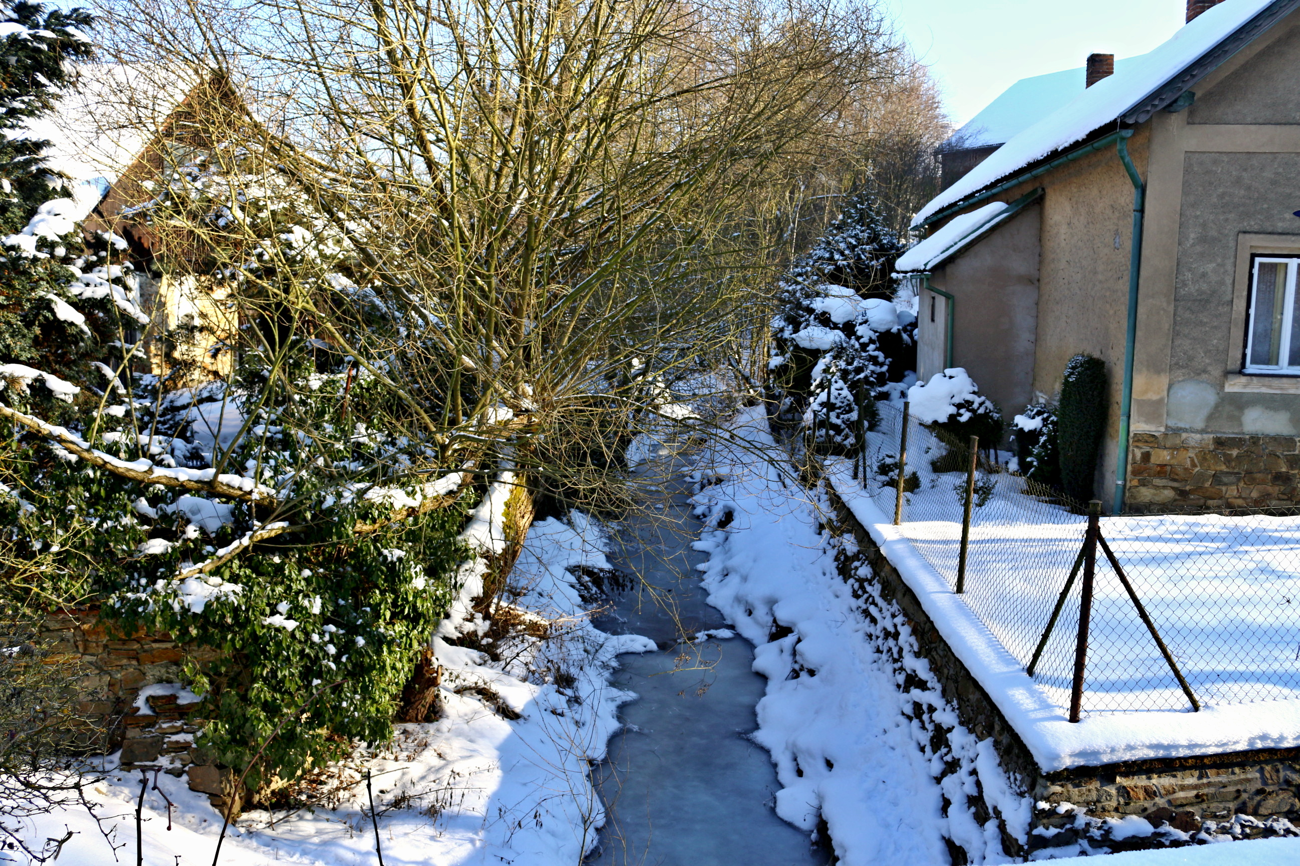 Úžice